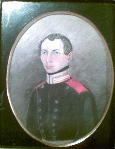 Stanisław Andrzej Grabowski ur. 21 listopad 1771 r. w Strzyżowie, Podkarpacie